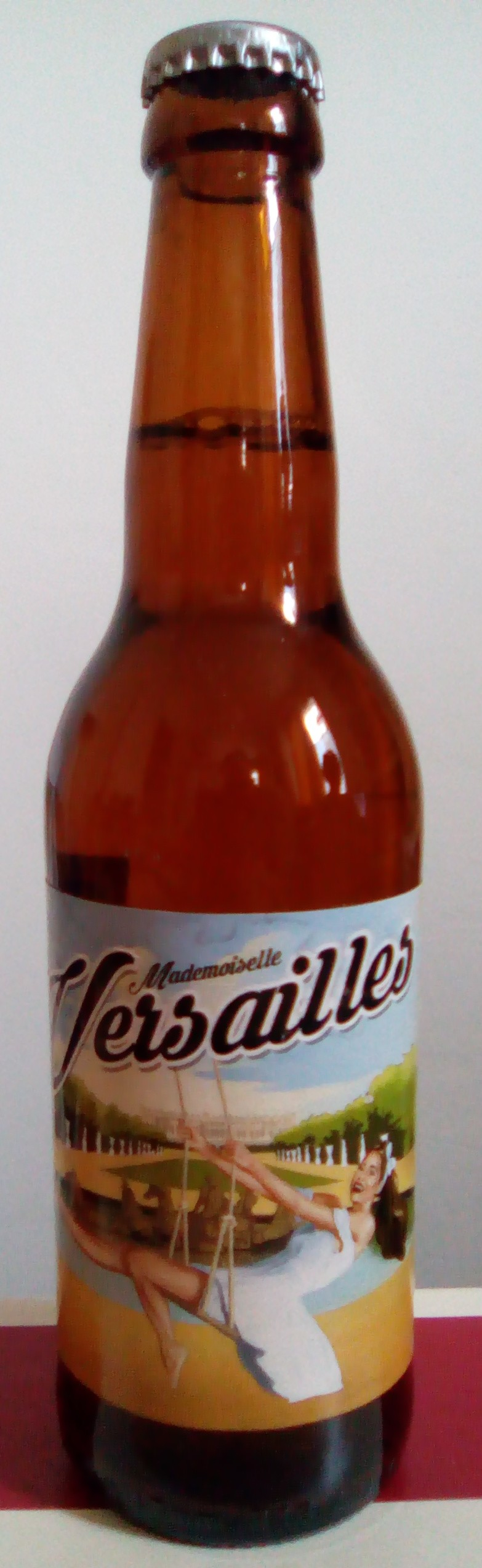 Bière "Mademoiselle Versailles", de la brasserie Distrikt (Yvelines)